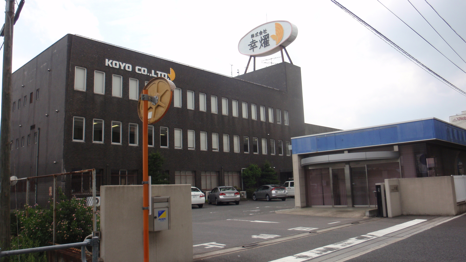 香川県高松市にある幸燿本社。